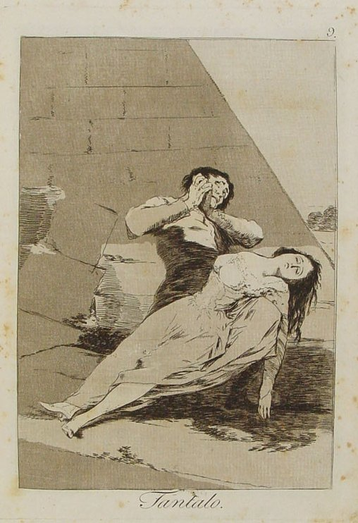 Capricho nº 9: Tántalo de Goya, serie Los Caprichos